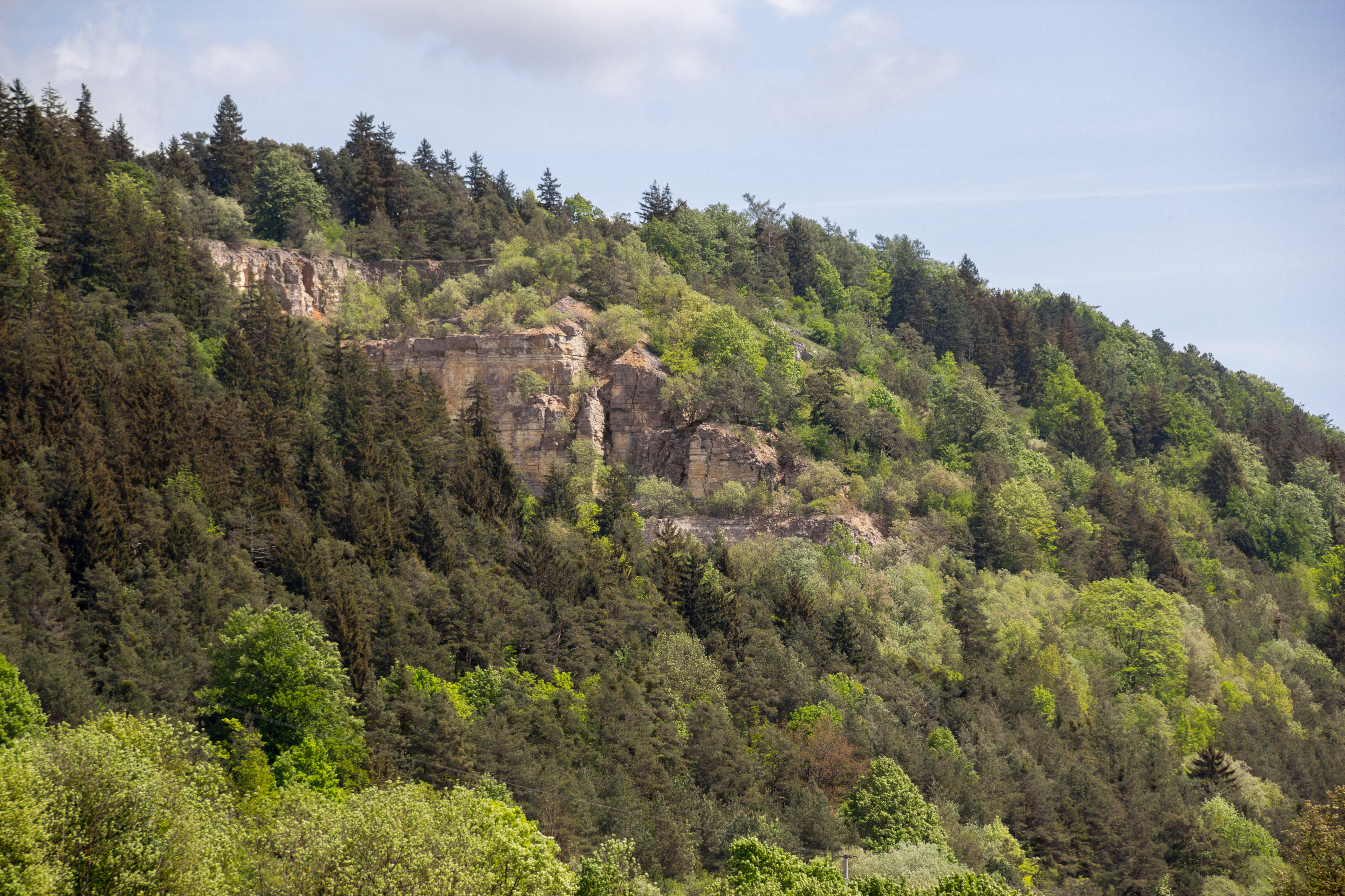 Steinbruch, Geotop, Arzberg, Beilngries